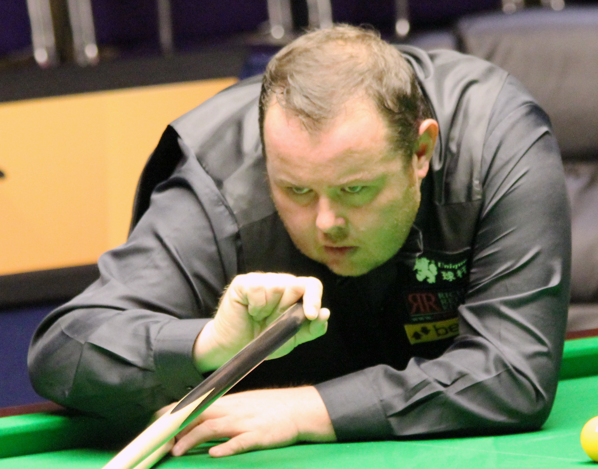 Stephen Lee beim Paul Hunter Classic 2012